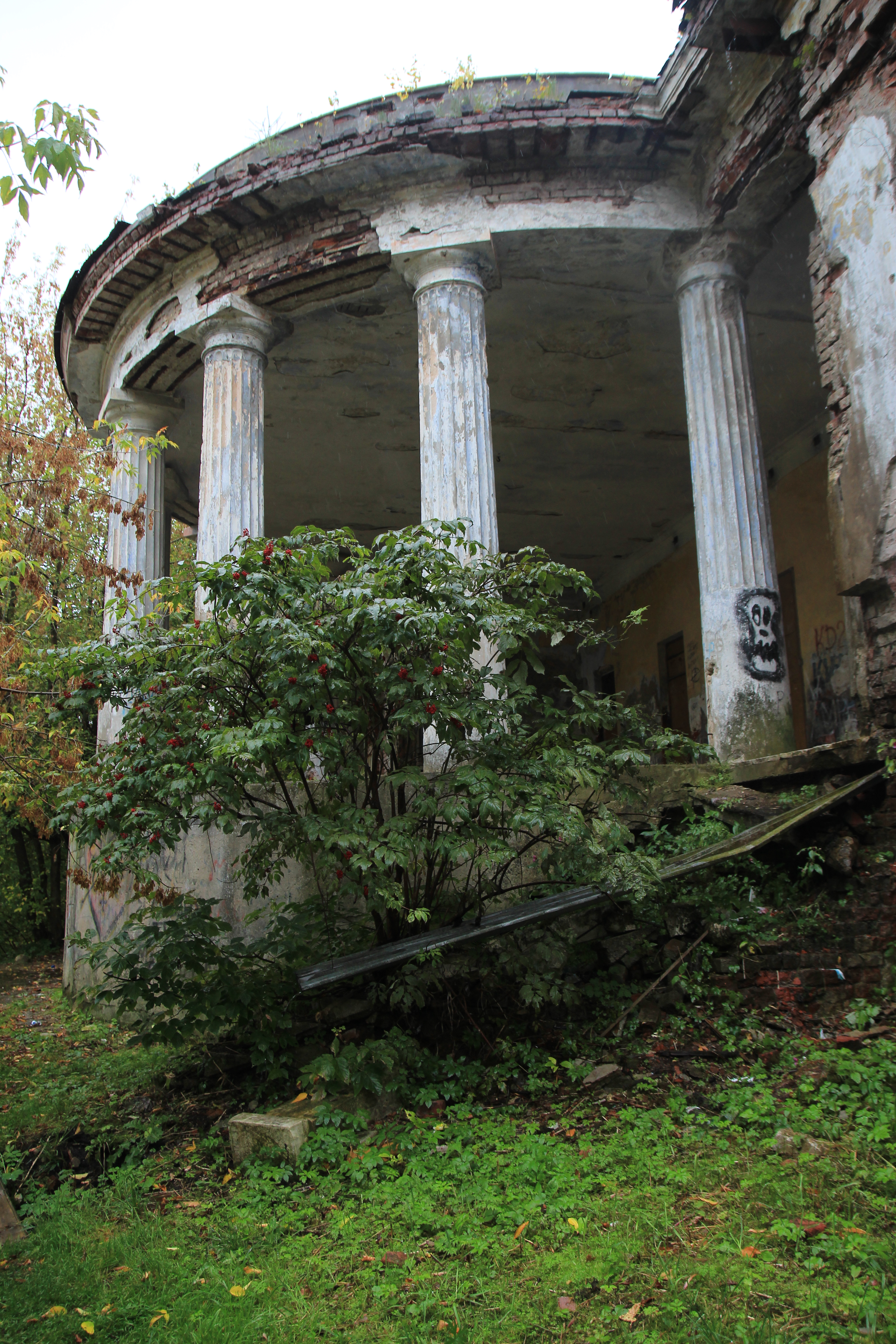 Фото дачи Севрюгова 2